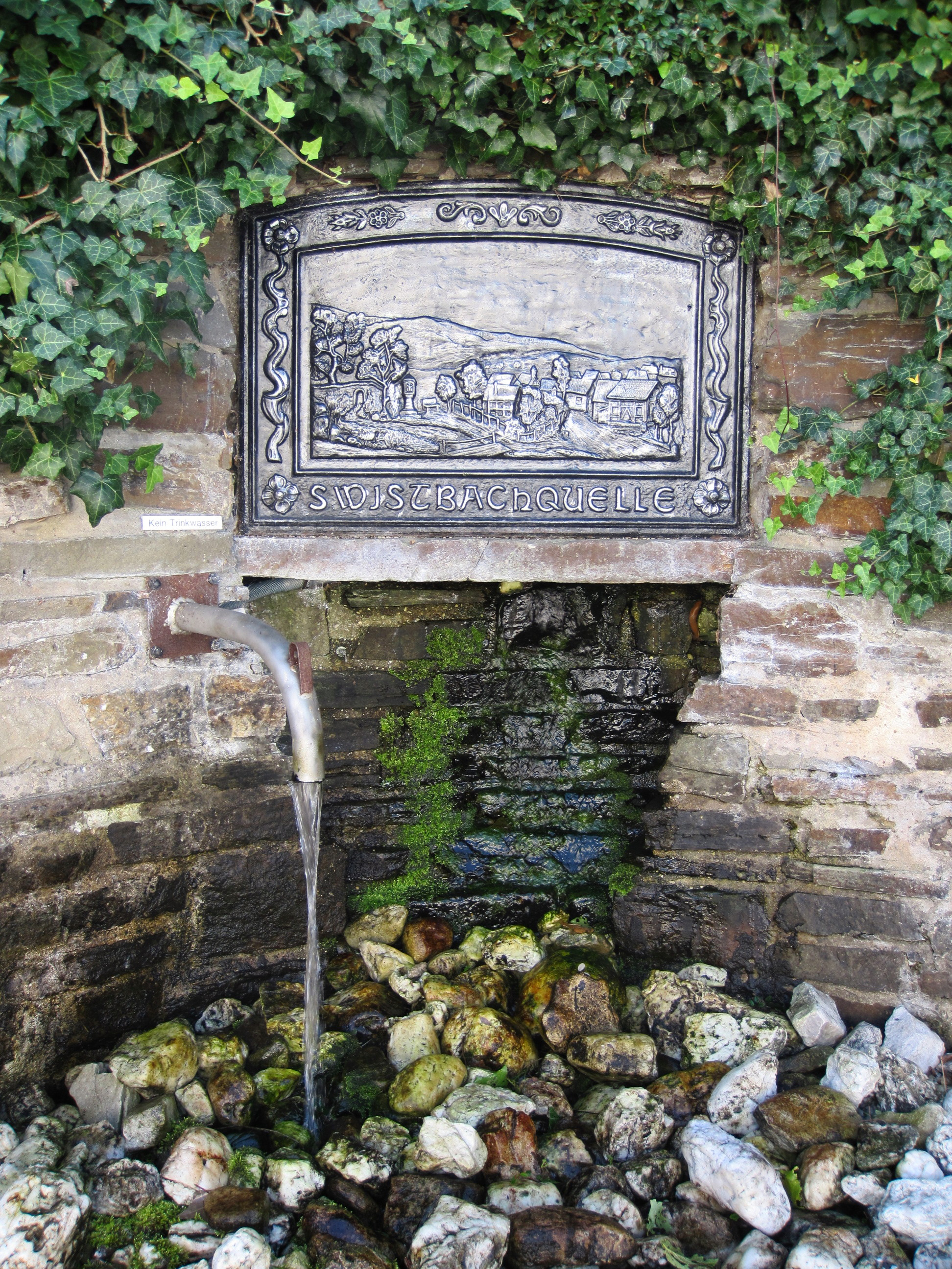 Swistquelle in Kalenborn (hoch)